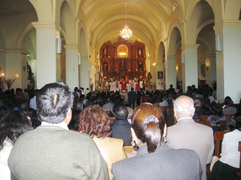 Interior de la Iglesia de Cabana, Región Ancash, Perú